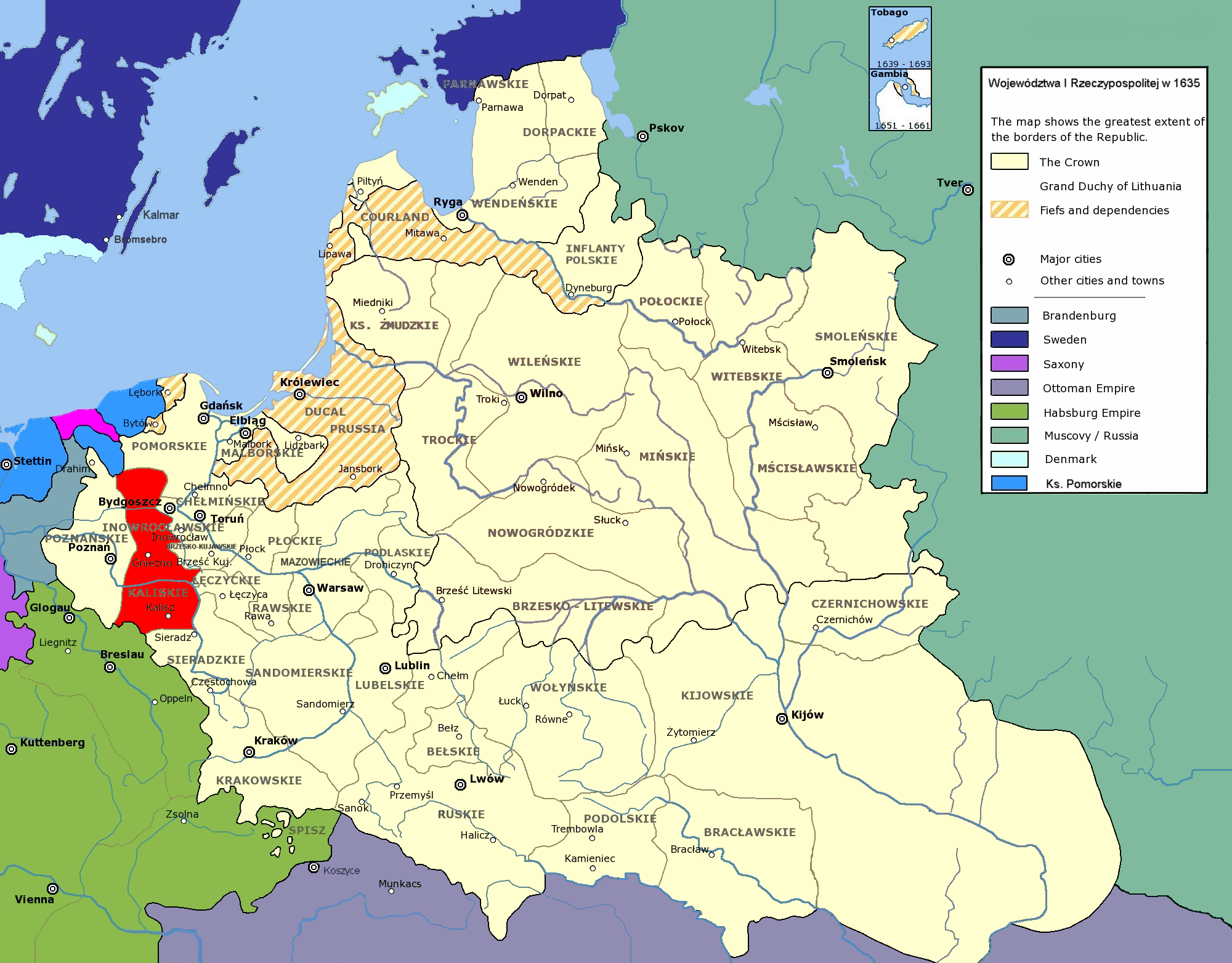 Rzeczpospolita Obojga Narodów w 1635 r.; województwo kaliskie Polish-Lithuanian Commonwealth in 1635; Kalisz Voivodeship